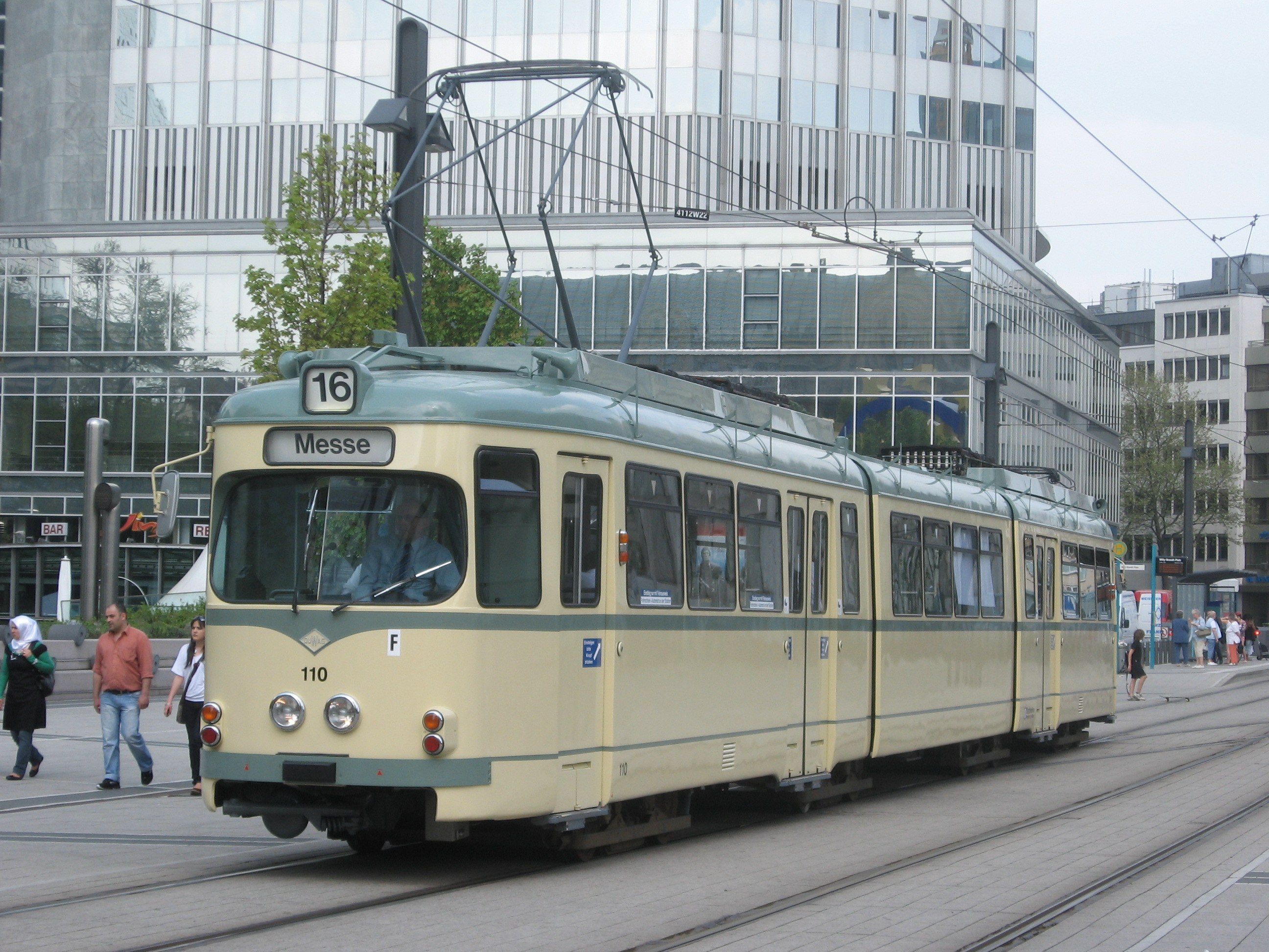 O-Wagen 110 der Verkehrsgesellschaft Frankfurt am Main am 15. April 2009 auf einer Sonderfahrt anlässlich seiner Restaurierung